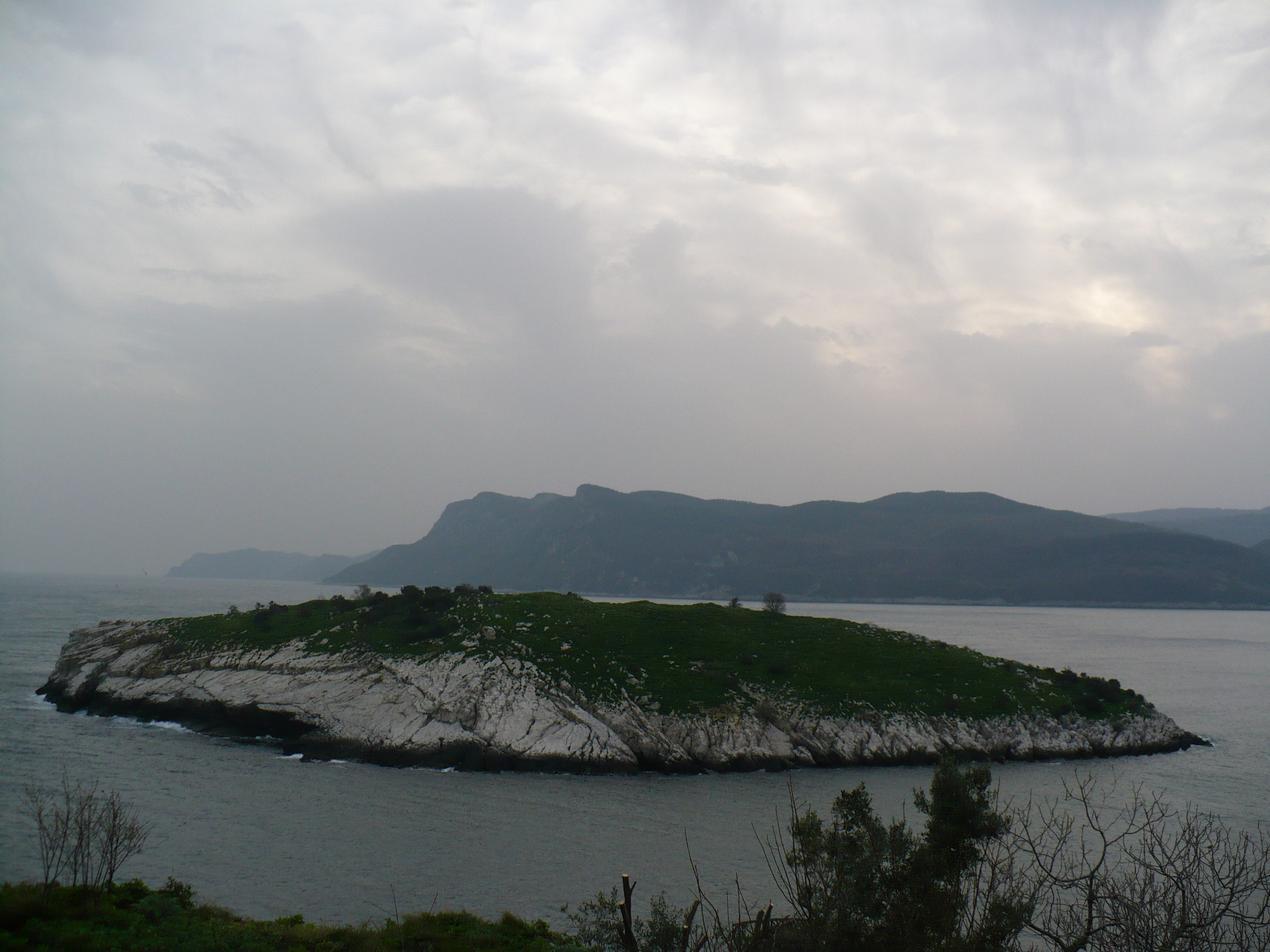 Amasra'dan bir görüntü